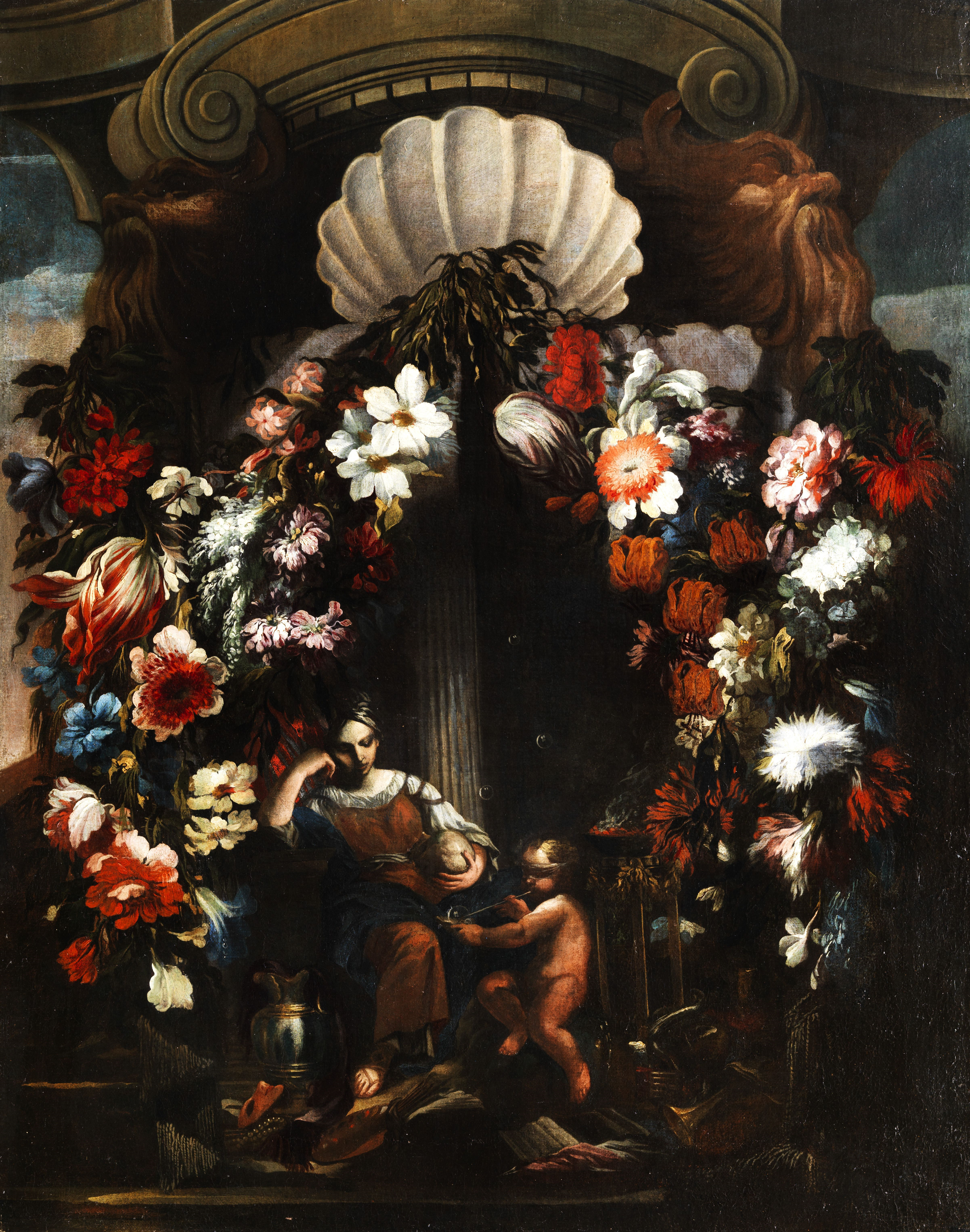 Allegorie der Künste und Wissenschaften (mit Putto mit Blasrohr und Seifenblase). Öl auf Leinwand. 96 x 79 cm.